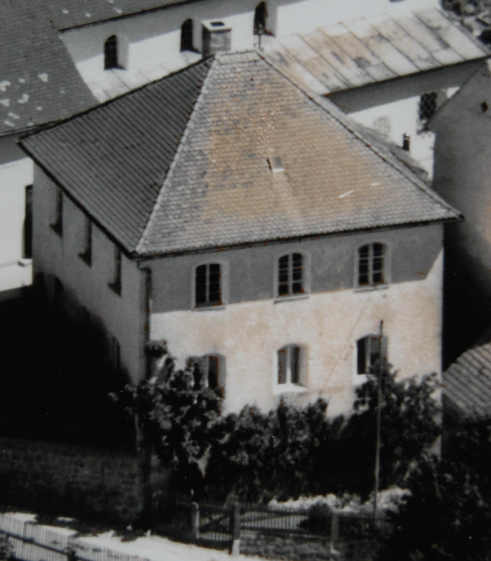 Erstes Schulhaus von Gleiritsch, das 1840 errichtet wurde. Später diente es als Lehrerwohnung. Es wurde inzwischen abgerissen.